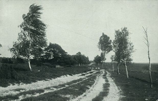 Originalbeschreibung: Winterweg in der Osterheide bei Südbostel